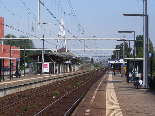 Station Utrecht Overvecht (Overvecht)